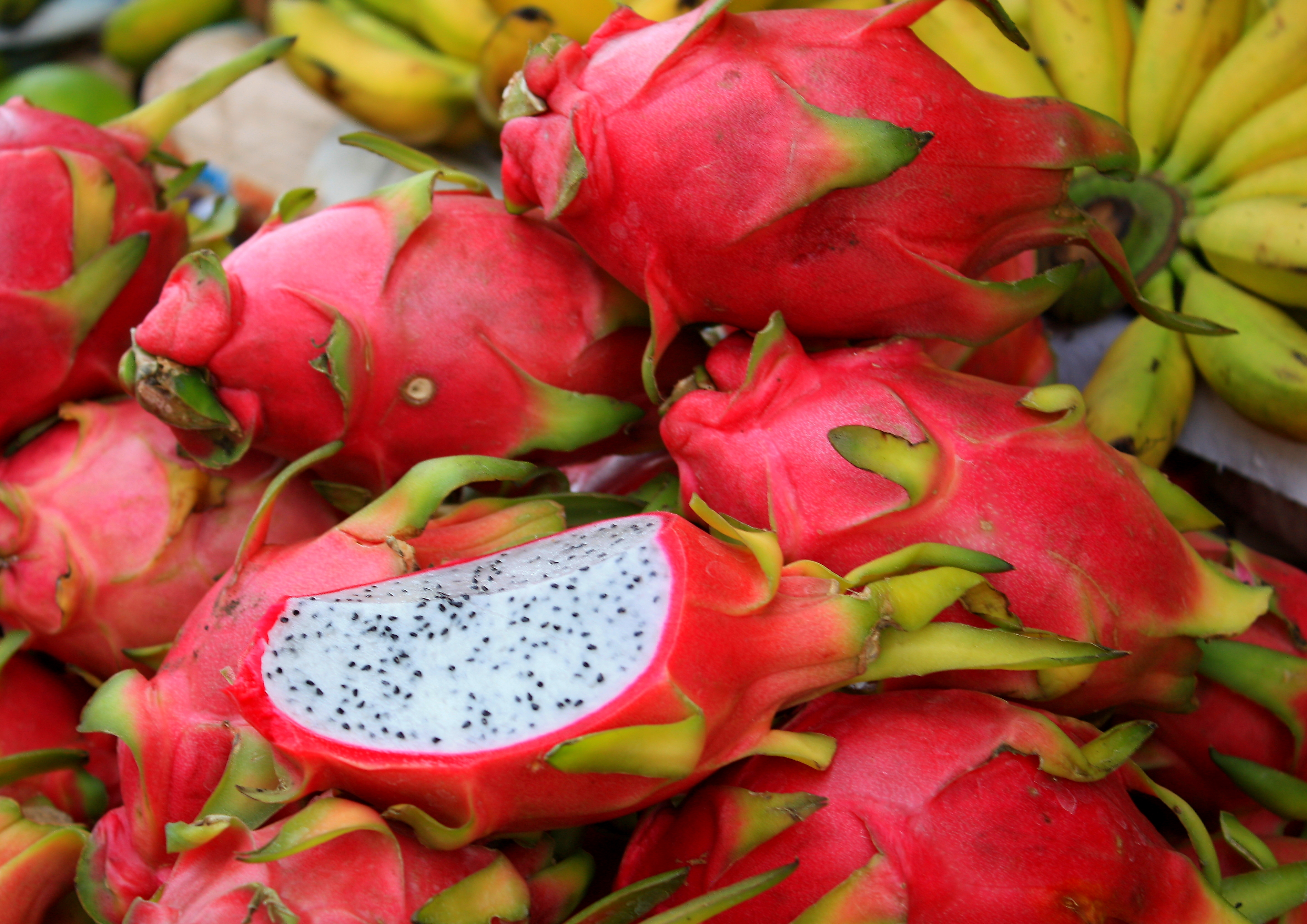 Siem Reap Markets